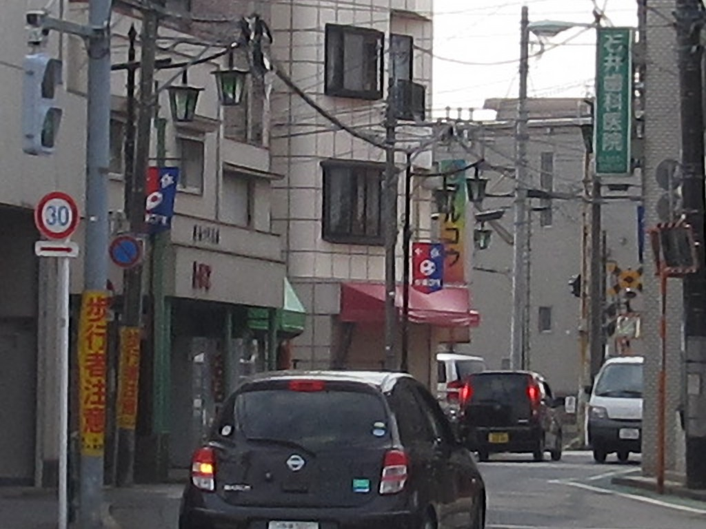 人見街道（多磨駅北踏切）